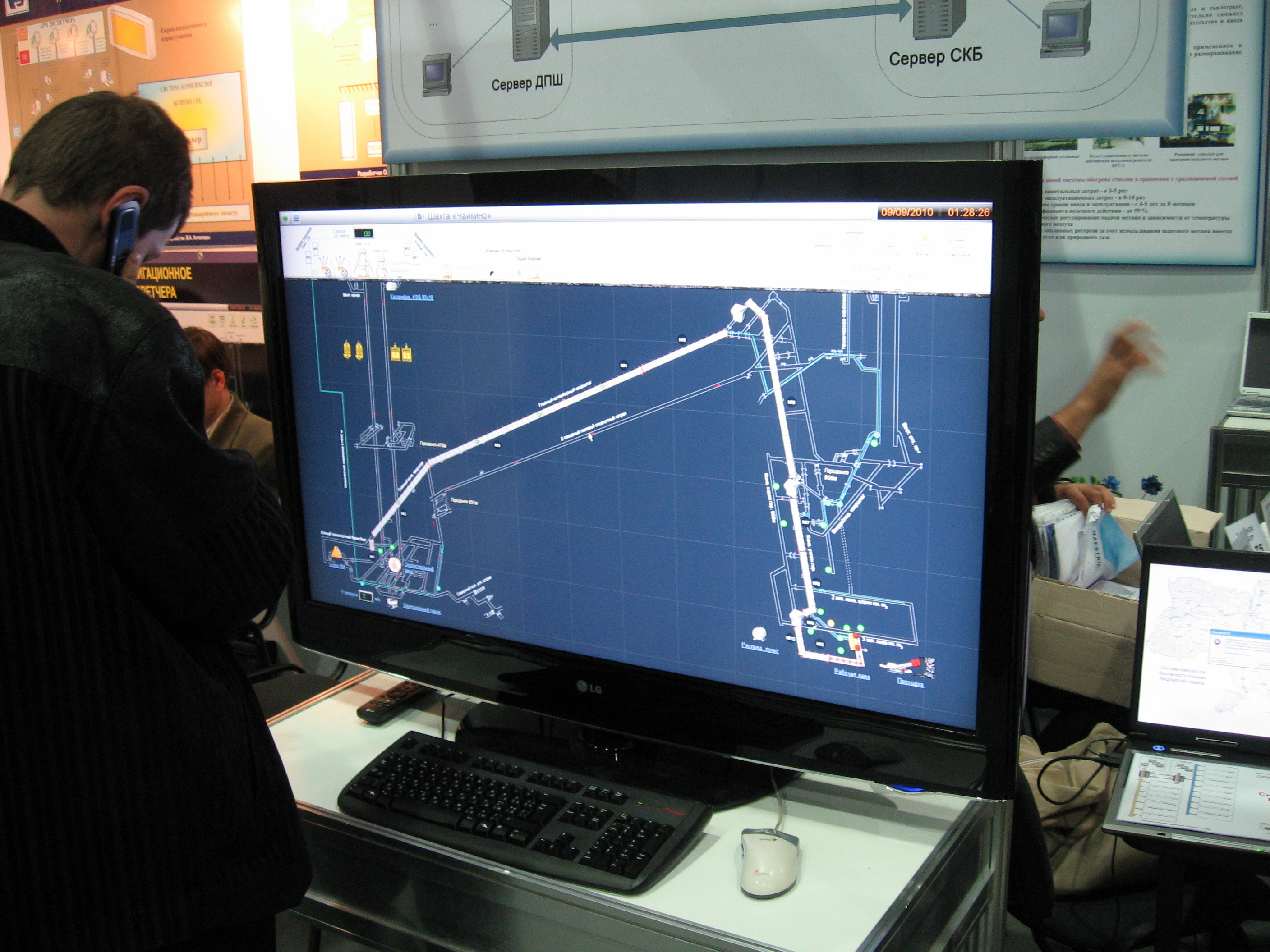 Фото з виставки Вугілля-Майнінг 2010